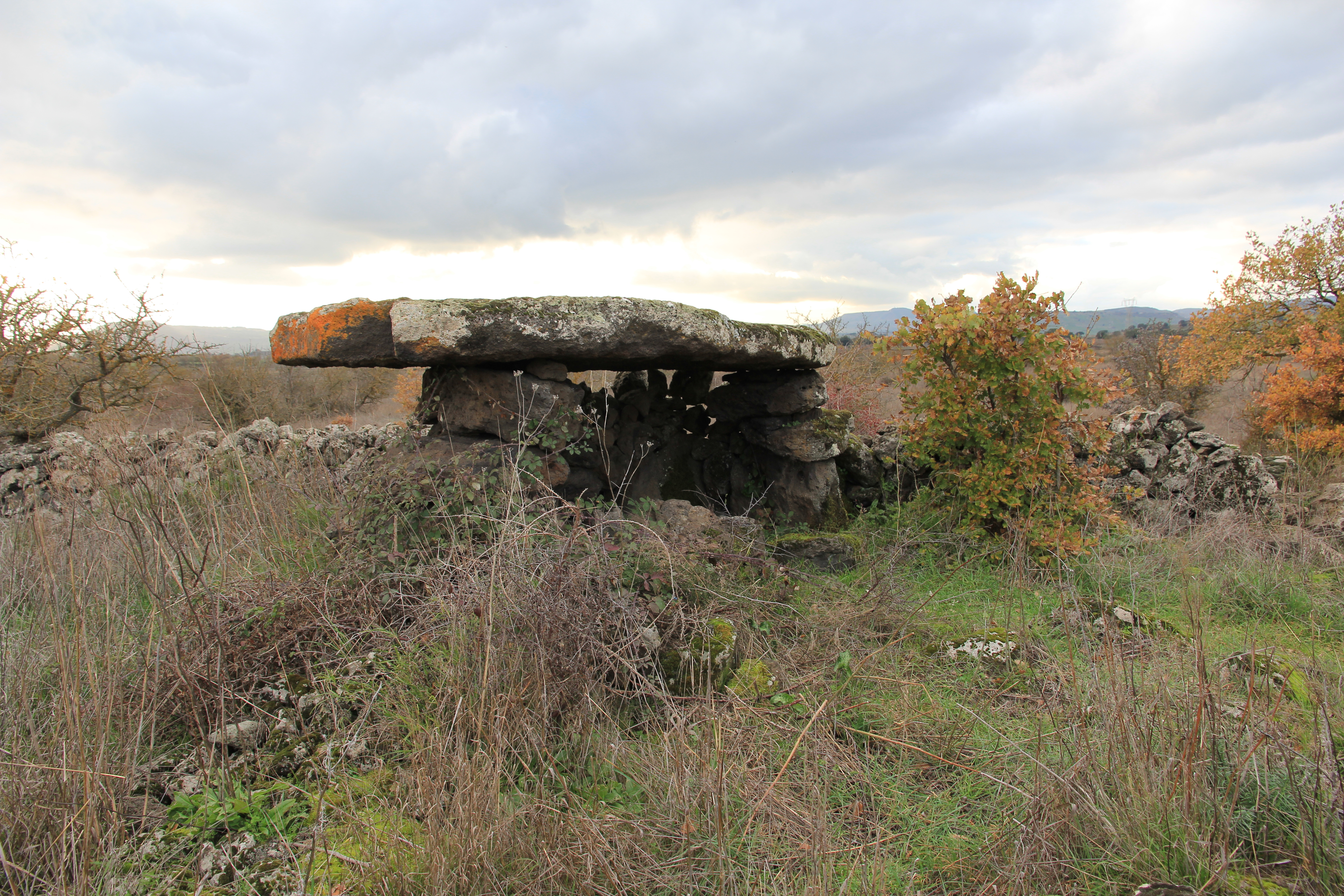 Torralba - Dolmen di Su Crastu Covaccadu